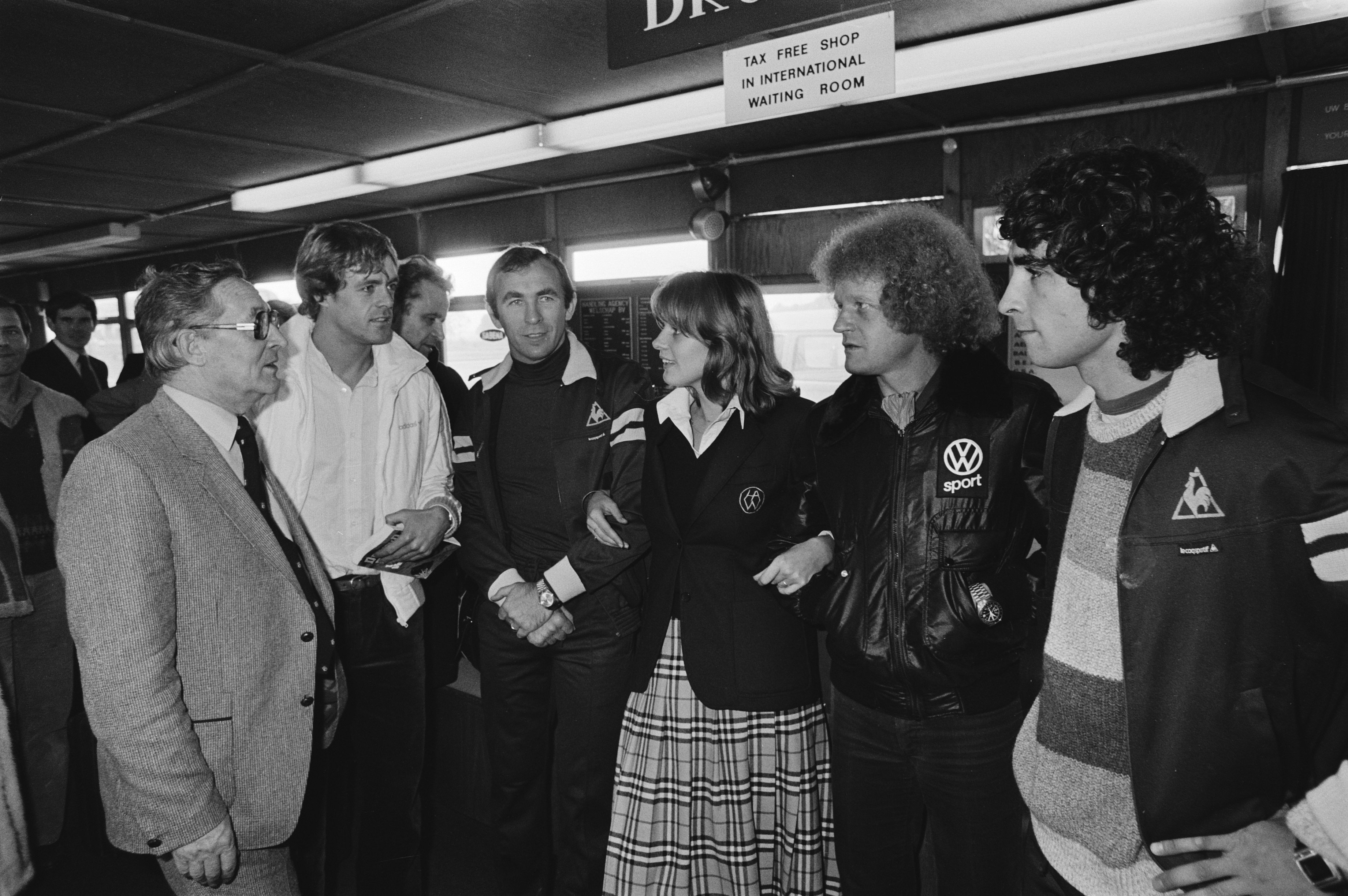 Collectie / Archief : Fotocollectie Anefo Reportage / Serie : Voetbalclub St. Etienne arriveert op vliegveld Welschap voor de voetbalwedstrijd in het kader van de Europacup tegen PSV Beschrijving : oa.a. Johnny Rep, doelman Ivan Ivan Curkovic , trainer Herbin en Rocheteau Datum : 23 oktober 1979 Locatie : Eindhoven Airport Trefwoorden : sport, trainers, voetbal, voetballers Persoonsnaam : Rep, Johnny Fotograaf : Croes, Rob C. / Anefo Auteursrechthebbende : Nationaal Archief Materiaalsoort : Negatief (zwart/wit) Nummer archiefinventaris : bekijk toegang 2.24.01.05 Bestanddeelnummer : 930-5059